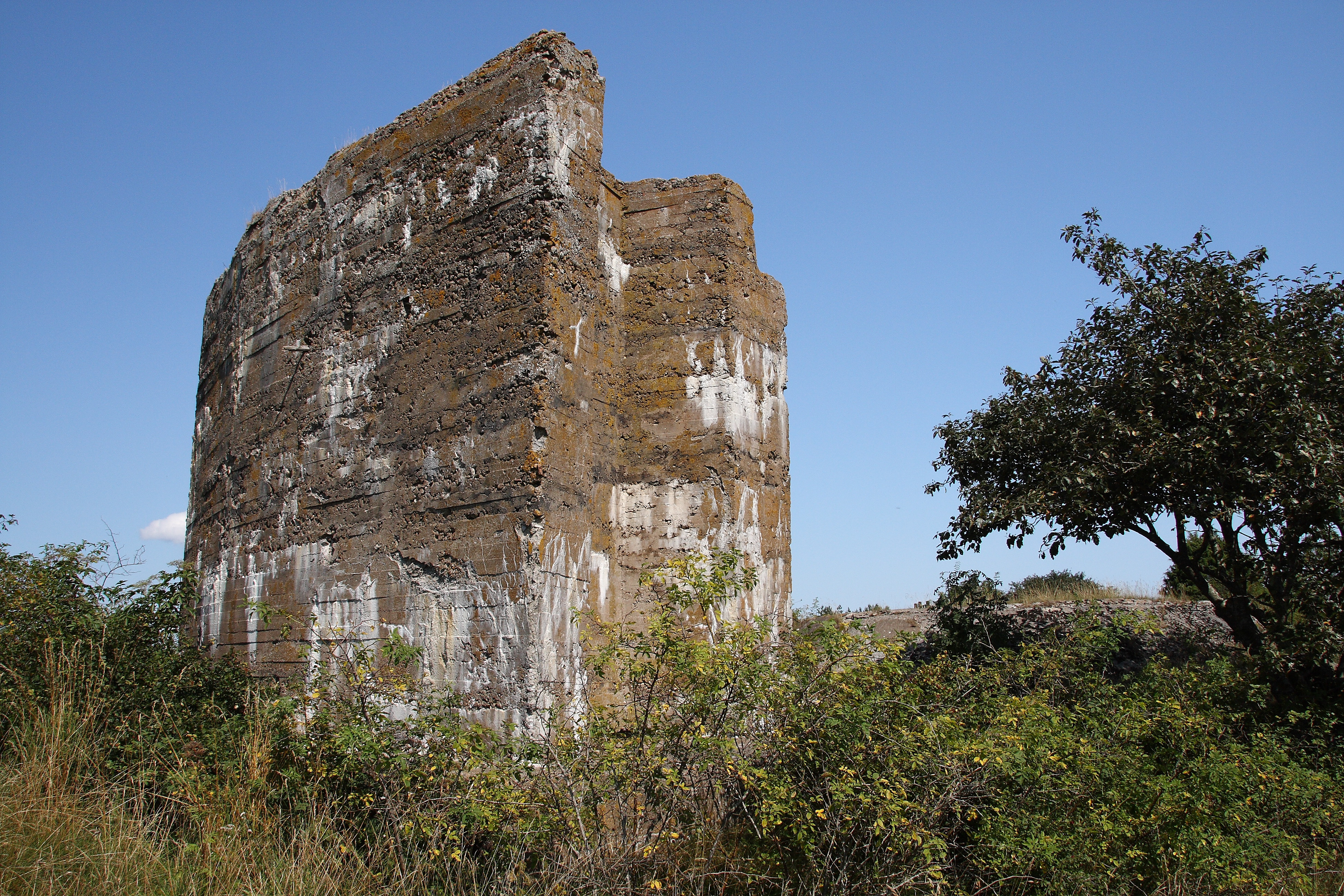 Остатки укреплений батареи №43 на мысе Церель